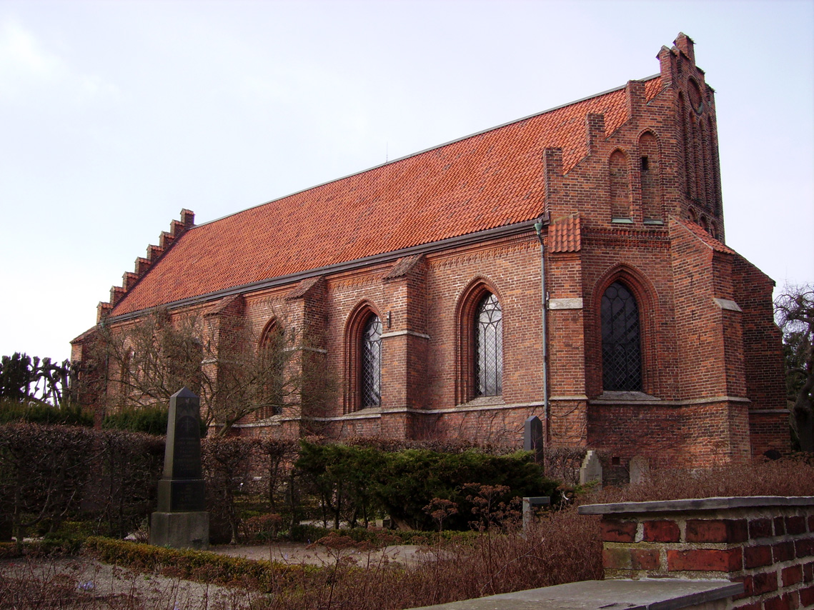 Sankt Peters klosterkyrka in Lund, Sweden